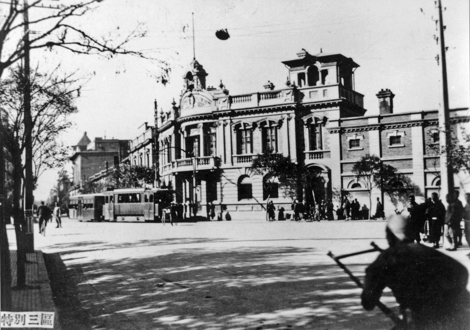 天津俄租界工部局大楼